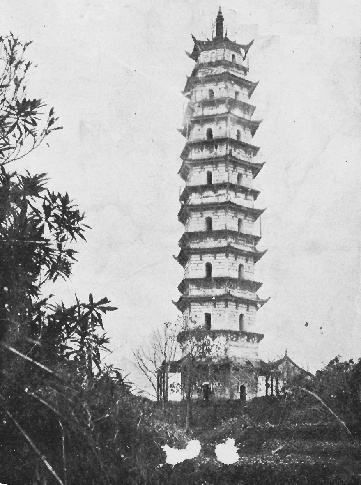 金华万佛塔旧照，摄于1942年之前。